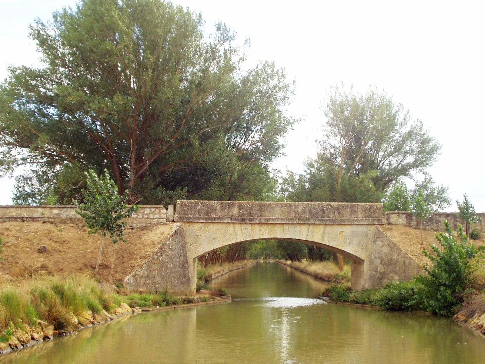 Medina de Rioseco. Valladolid. Canal de Catilla. Puente de Villalón.